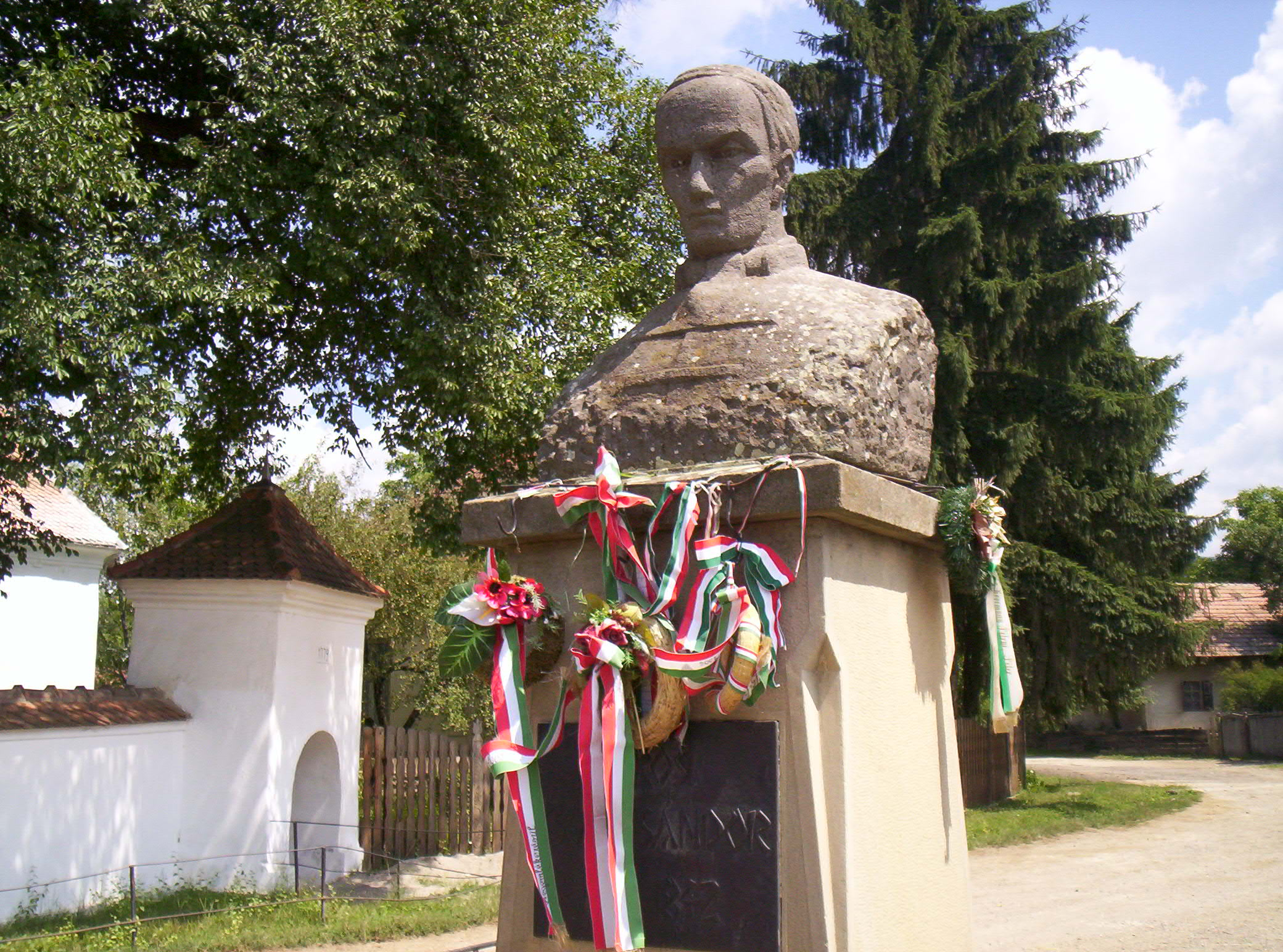 Kőrösi Csoma Sándor szobra Csomakőrösön – photo taken by uploader User:Csanády in 2006.